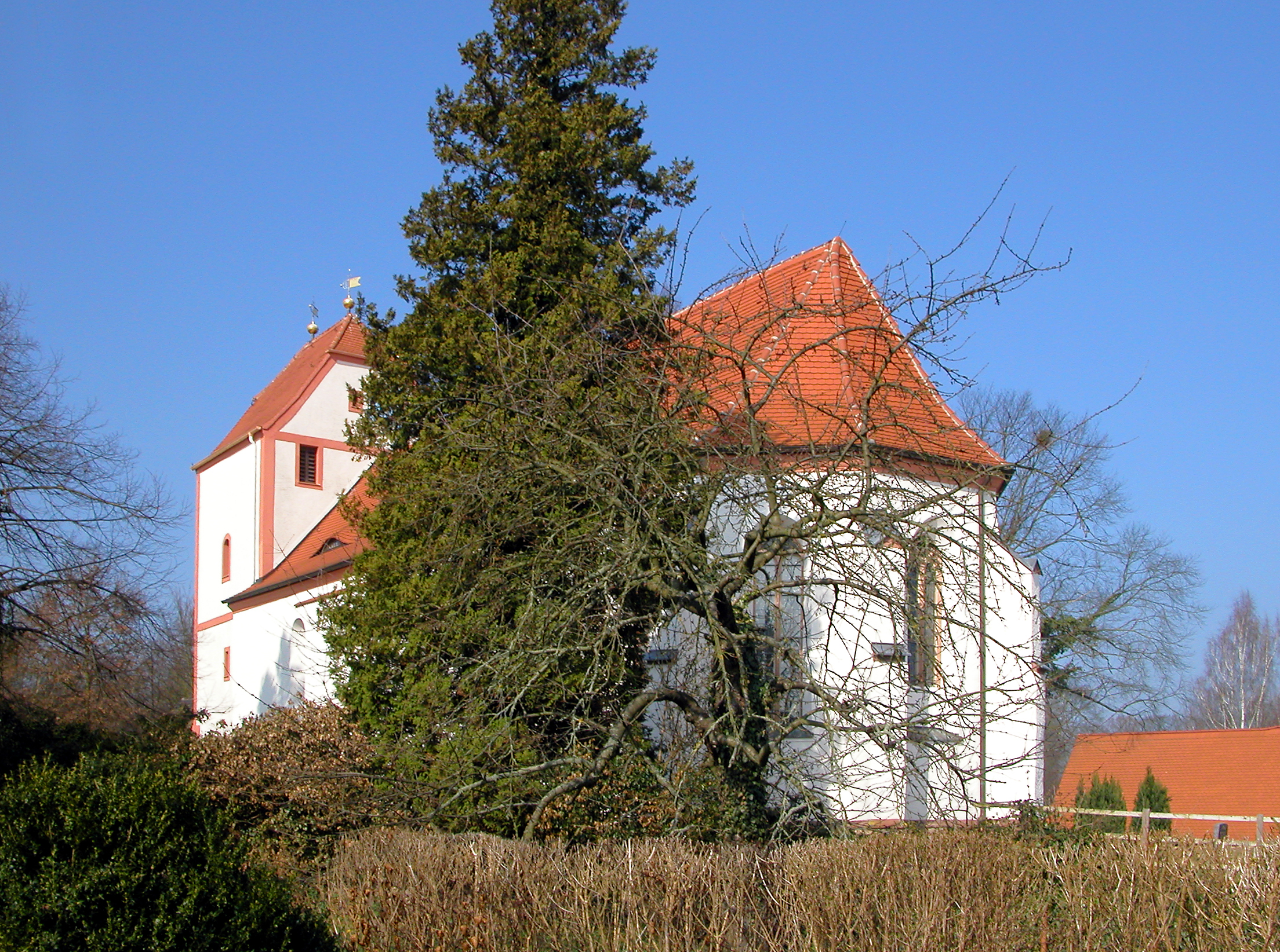 23.03.2012 04828 Leulitz (Bennewitz): Dorfkirche von 1314, Polenzer Straße (GMP: 51.335337,12.669864), [DSCNn3418.TIF]20120323125DR.JPG(c)Blobelt